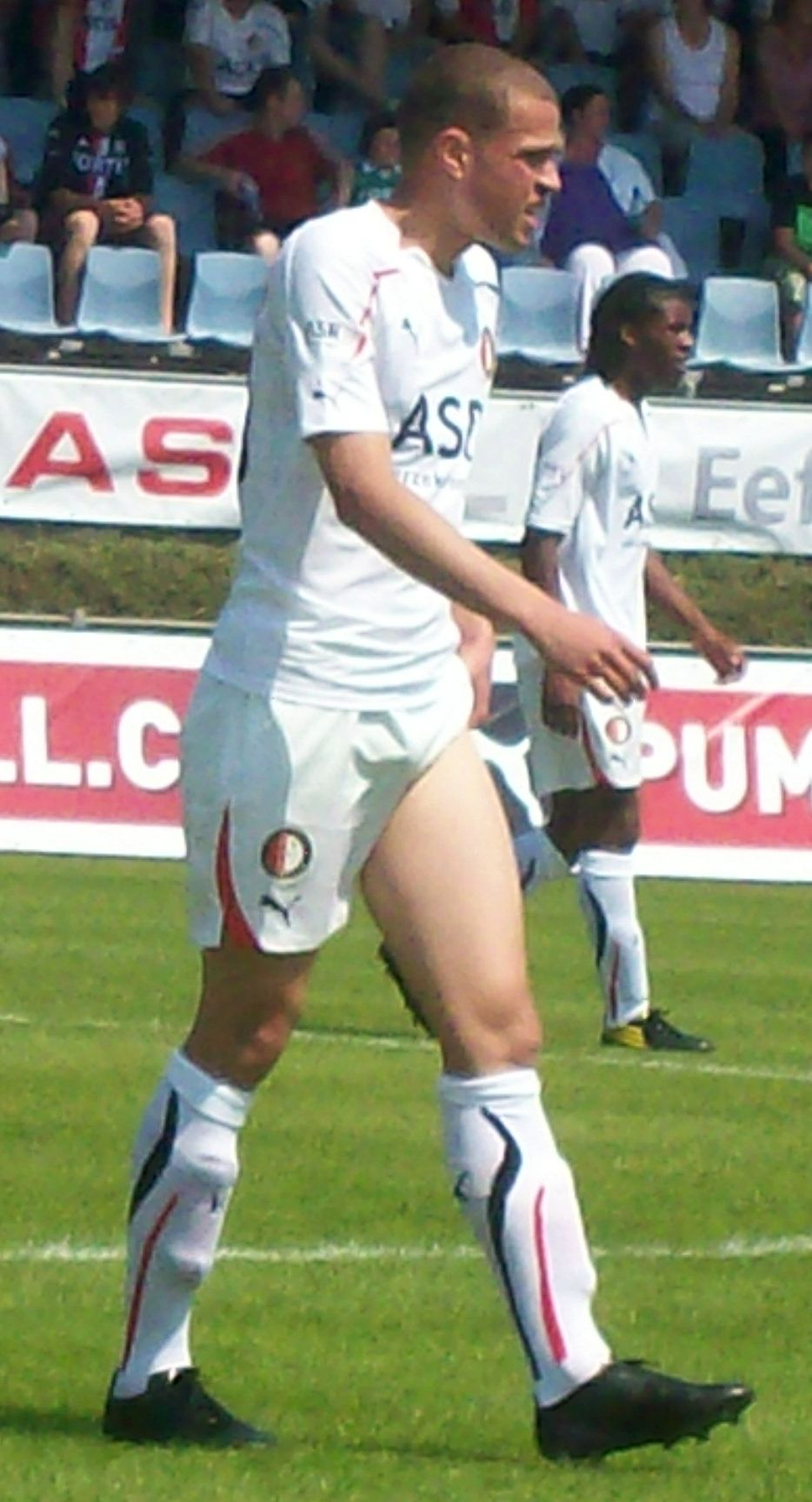 Luc Castaignos tijdens de eerste training van Feyenoord.